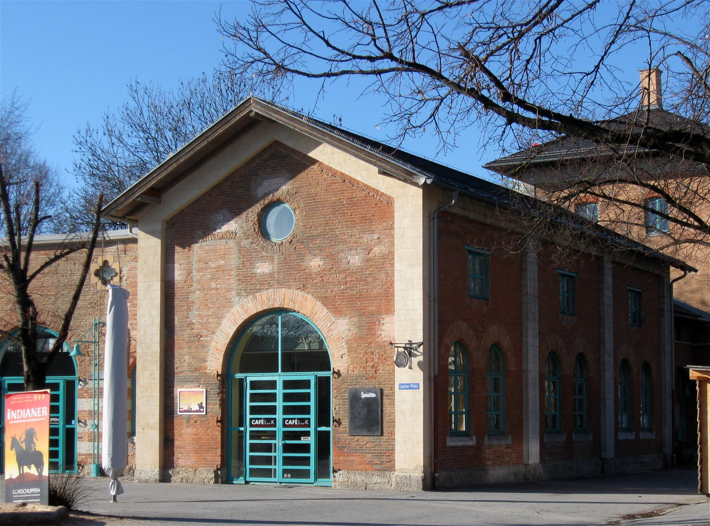 Rathausstraße 22, 26; ehem. Güterbahnhof, jetzt Lagerhallen; Anlage um 1860, zwei Eckpavillons, rückwärts halbkreisförmig die ehem. Lokomotivenhalle (z. T. verändert)